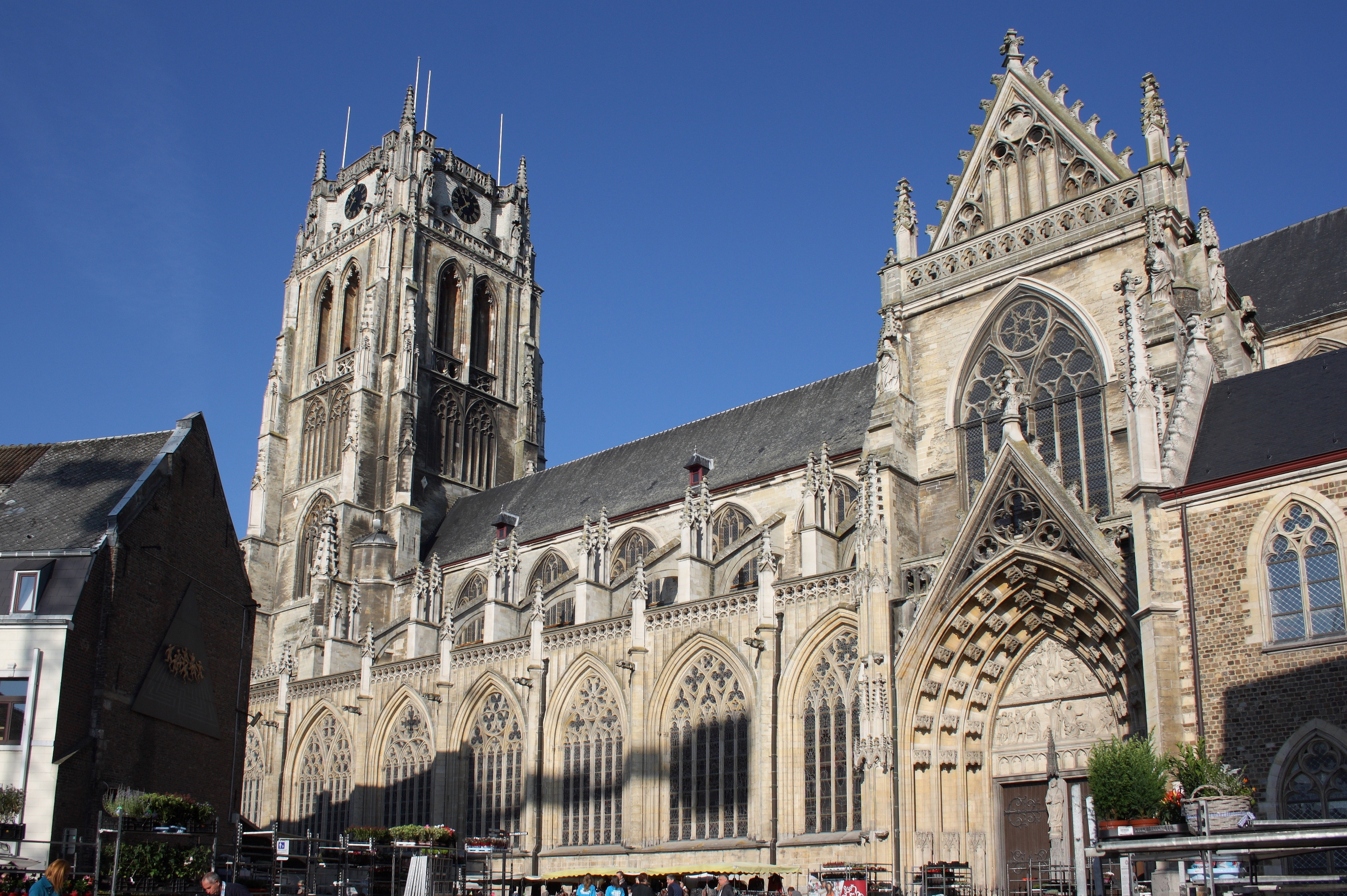 Liebfrauenbasilika in Tongeren in der Provinz Limburg (Belgien), Südseite